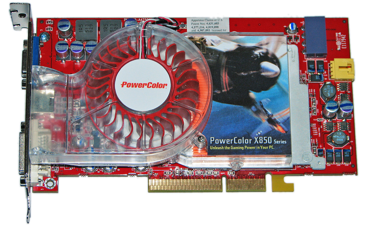 Beschreibung: Radeon X850XT Platinum Edition from PowerColor Fotograf: Darkone, 8. Dezember 2005